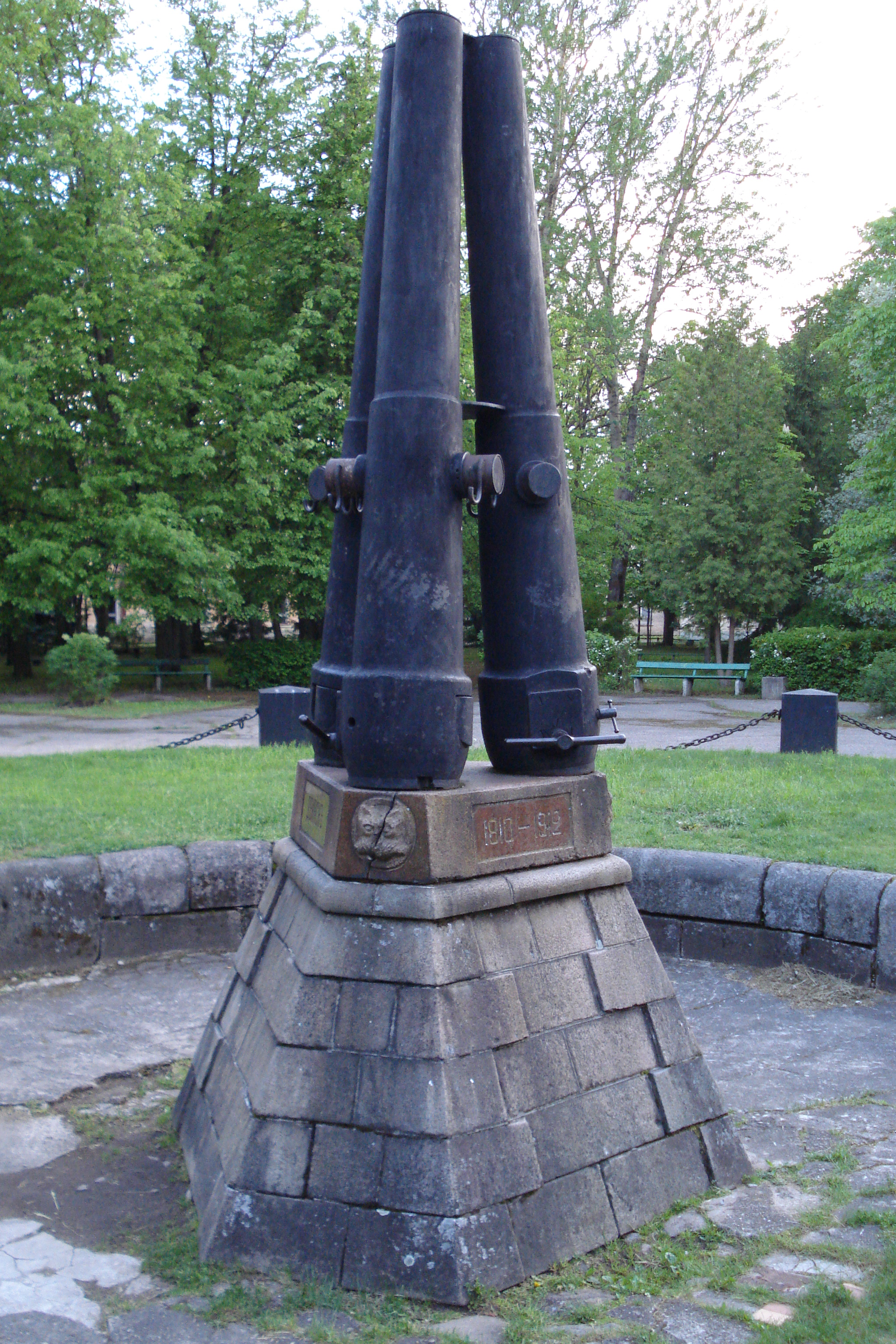 The fountain of cast iron 19th century's cannons in memory of the war 1812, erected in 1912. Фонтан-памятник «Слава русскому оружию» в память о 100-летии войны 1812 года в Двинской крепости, открыт в 1912 г.